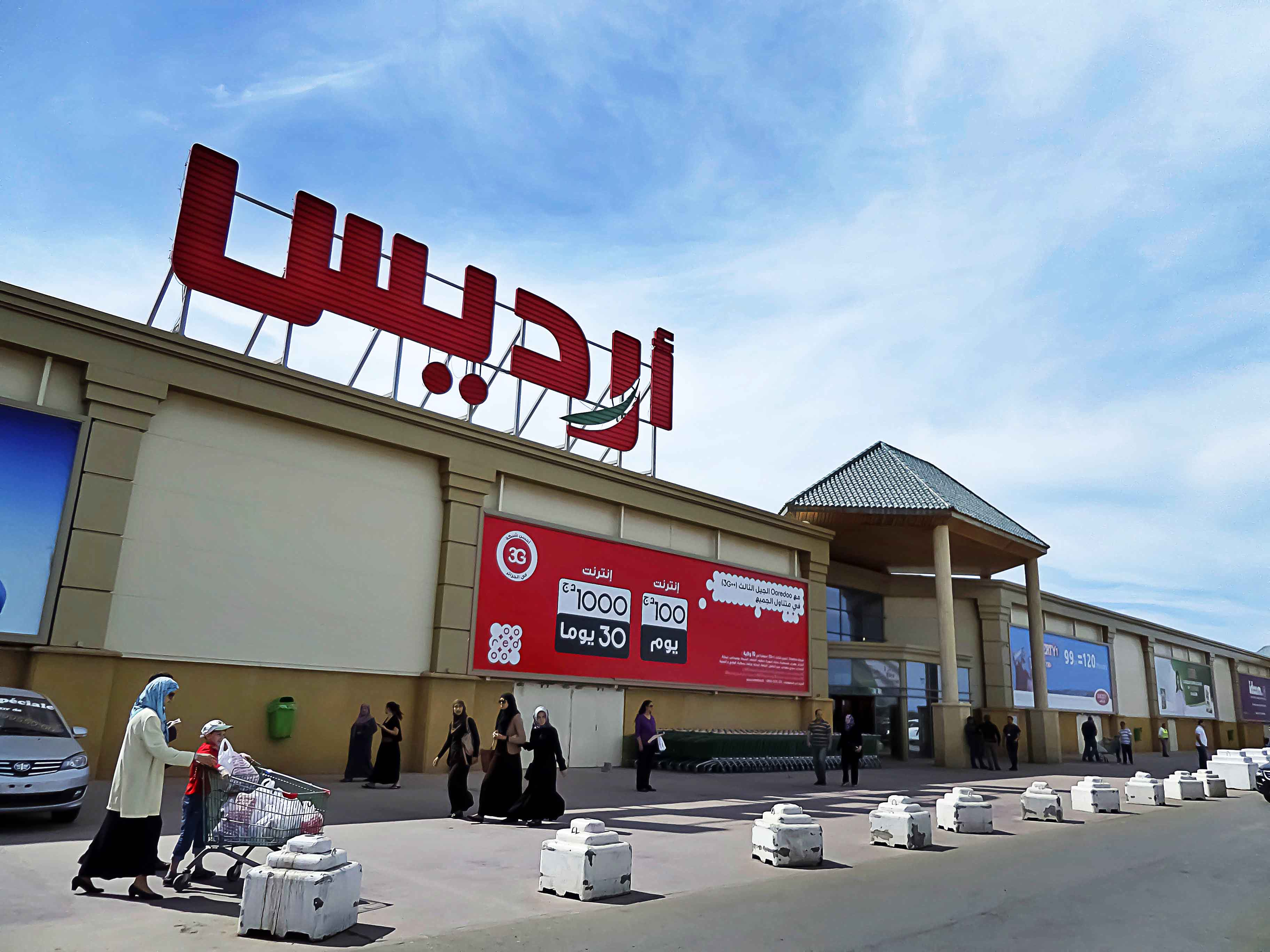 Ardis, centre commercial à Mohammadia, Alger, Algerie